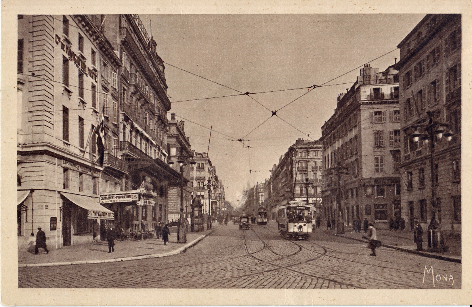 Carte postale ancienne éditée par Mona, collection Les petits tableaux de la Provence n° SE 33 :MARSEILLE - La Canebière